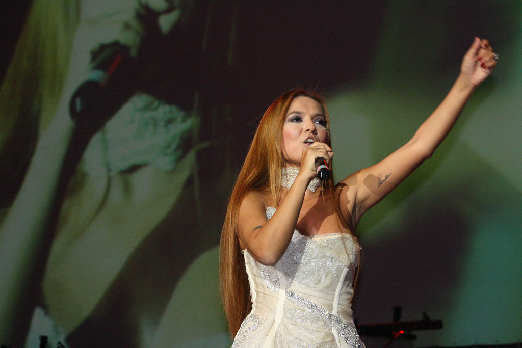 Demet Akalın Konser